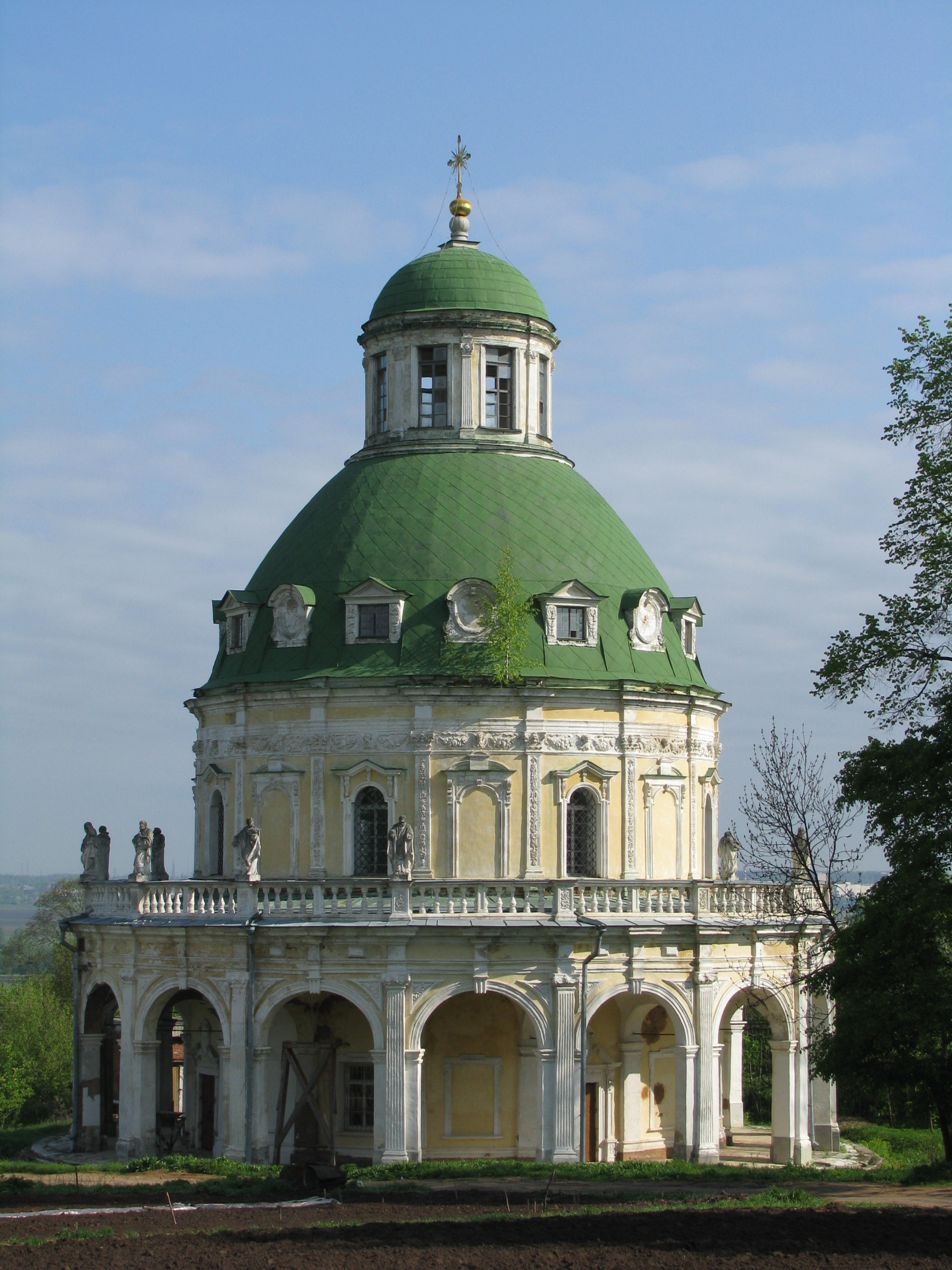 Church (1714—1722) in Podmoklovo village, Dolgorukovs' country estate (Serpukhov District, Moscow Region). South side./ Церковь Рождества Богородицы (1714—1722) в Подмоклове (Серпуховский район Московской области), усадьба Долгоруковых. Вид с юга.